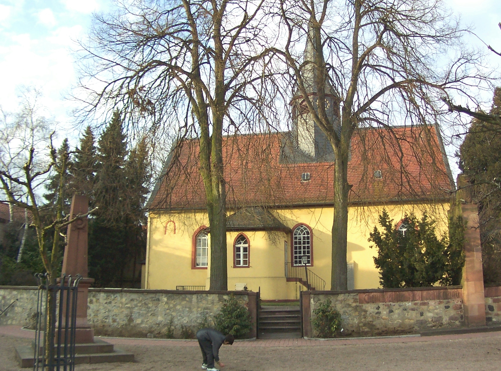 Evangelische Kirche in Groß-Karben